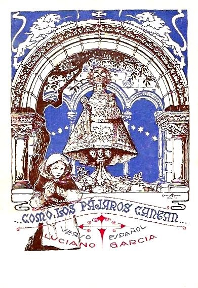 …Como los pájaros cantan… de Luciano García Rodríguez, Santiago de Compostela, 1931